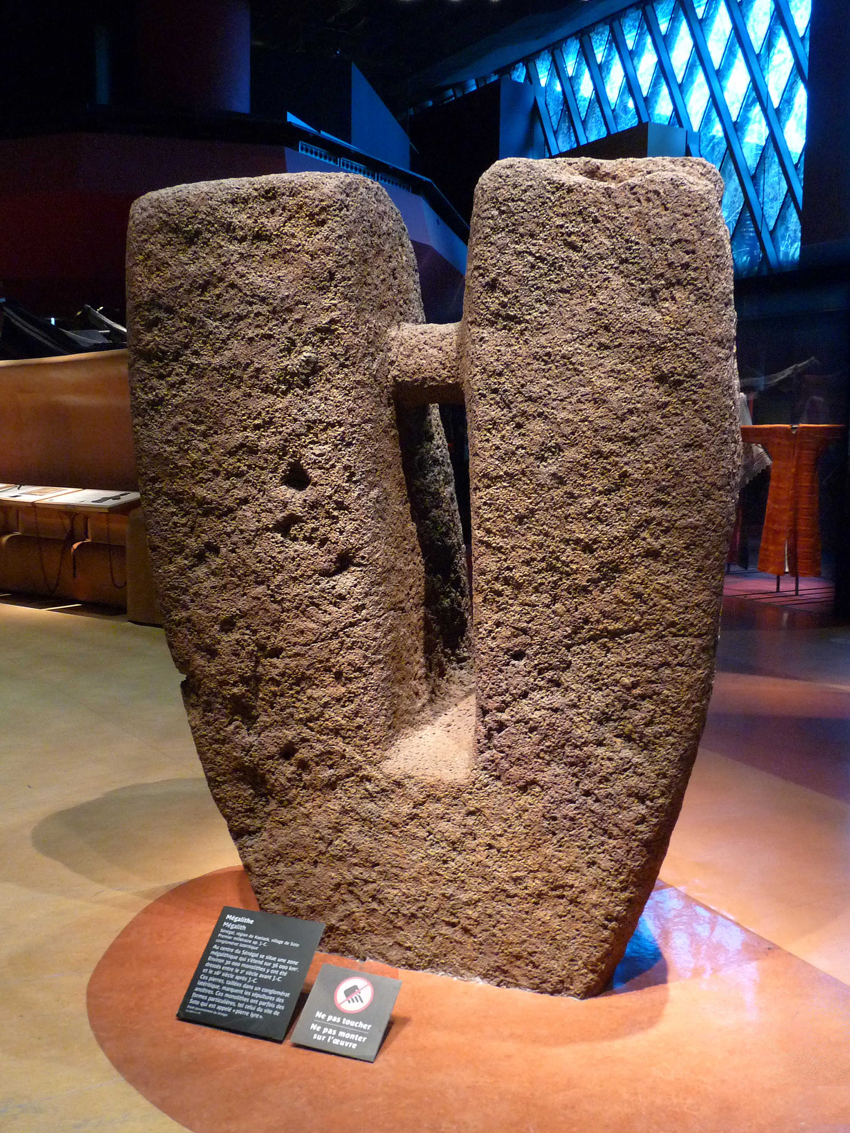 Mégalithe pierre-lyre, village de Soto, région de Kaolack, Sénégal, premier millénaire après JC. Conglomérat latéritique. Dépôt du gouvernement du Sénégal. Musée du quai Branly.